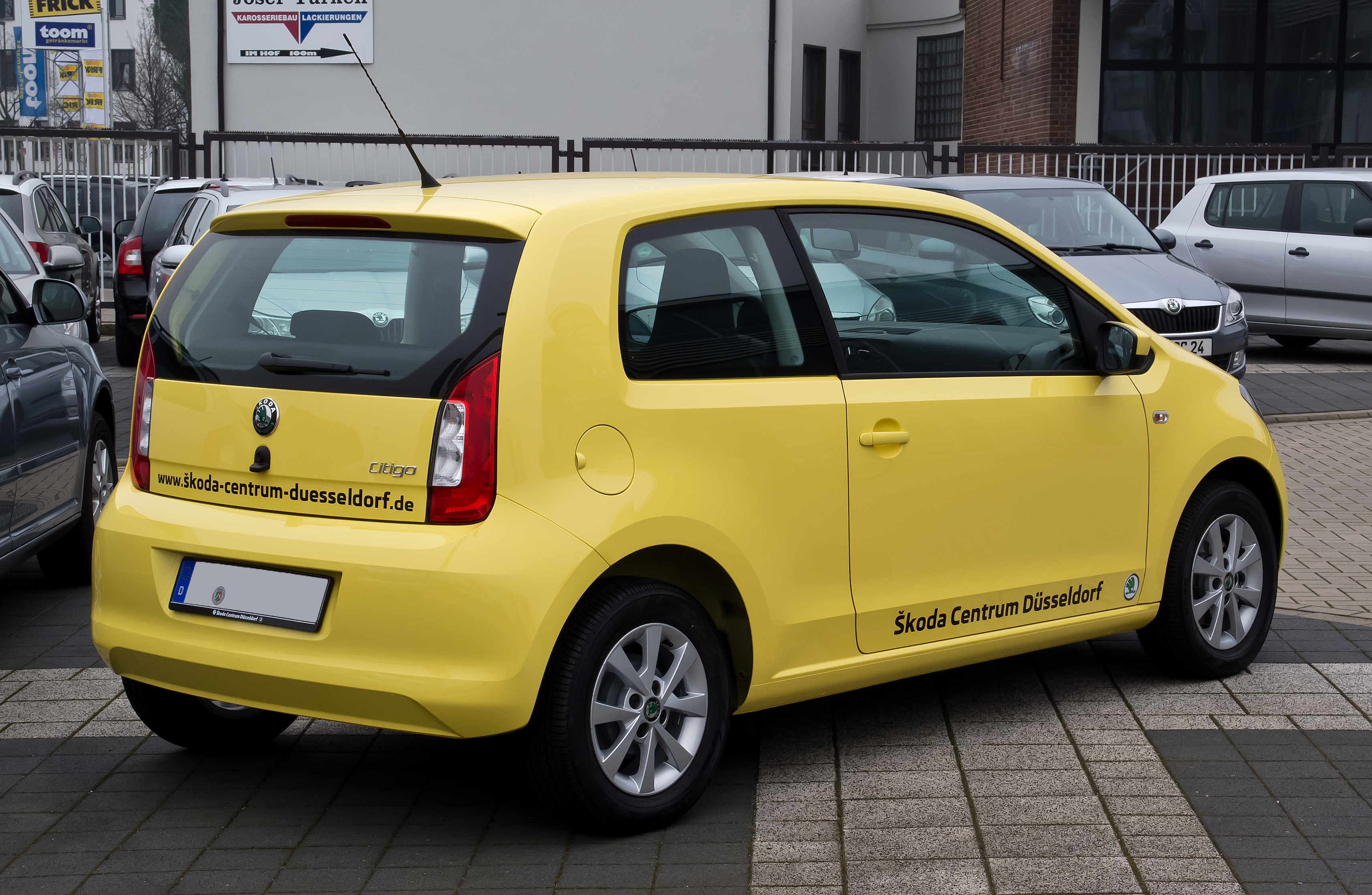 Skoda Citigo 1.0 Ambition